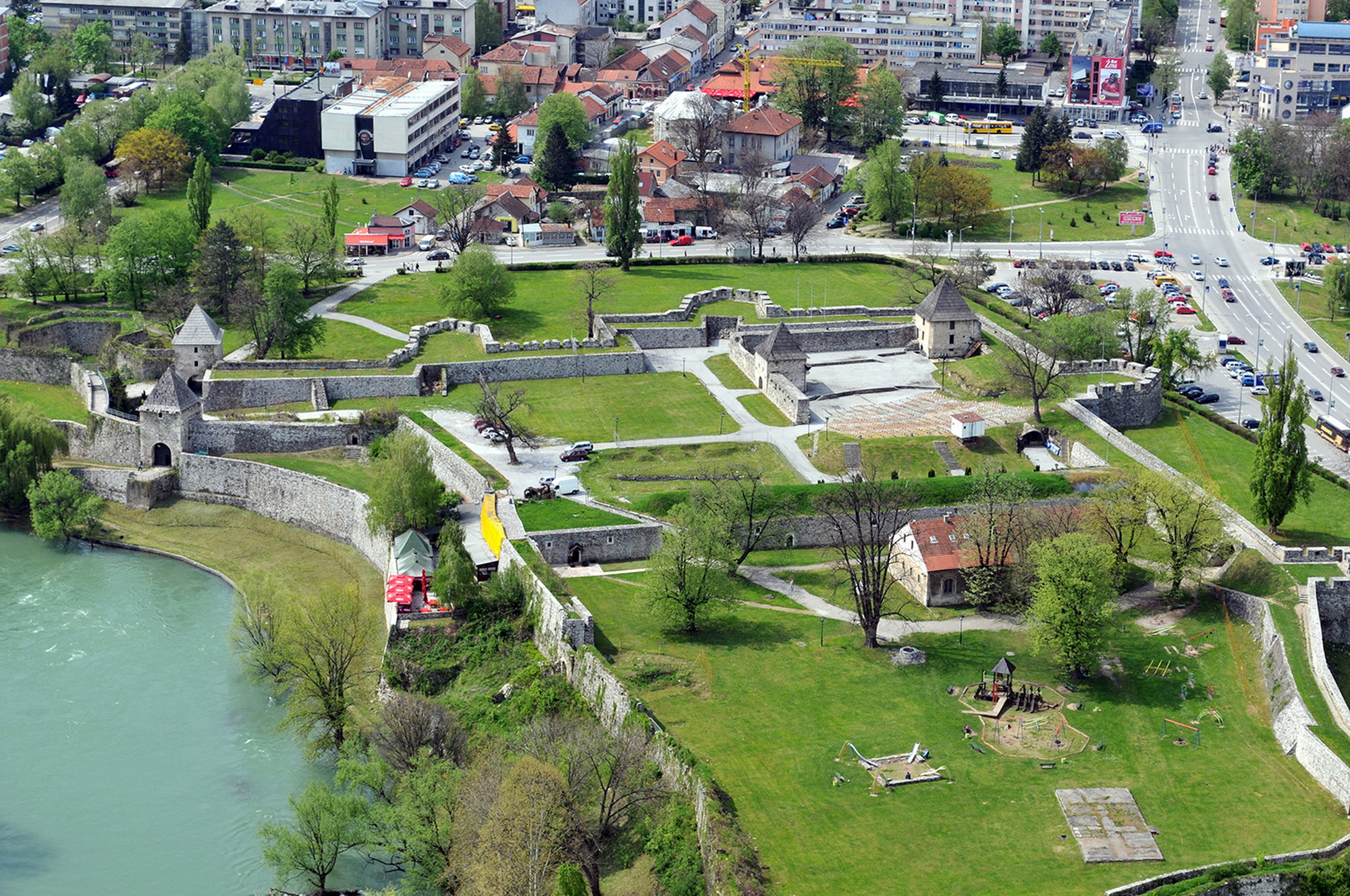 Tvrdjava kastel naj stariji istorijski objekat u Banja Luci This image was uploaded as part of Trace of Soul 2015.